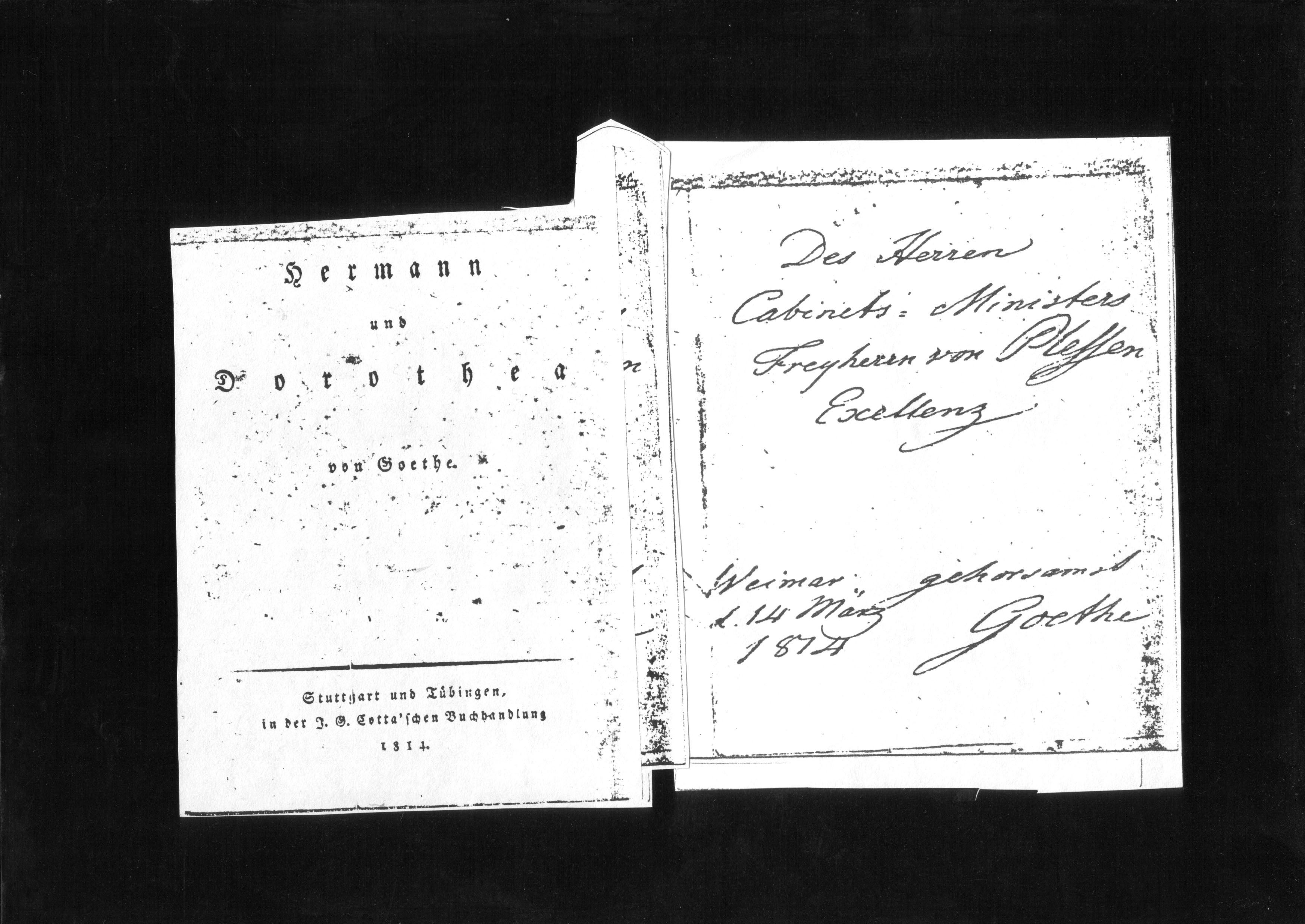 Einladungskarte J.W.v. Goethes an Leopold von Plessen zu Hermann und Dorothea Datum: 1814 Urheber Johann Wolfgang von Goethe Quelle: Fotokopie einer authentischen Einladungskarte Goethes